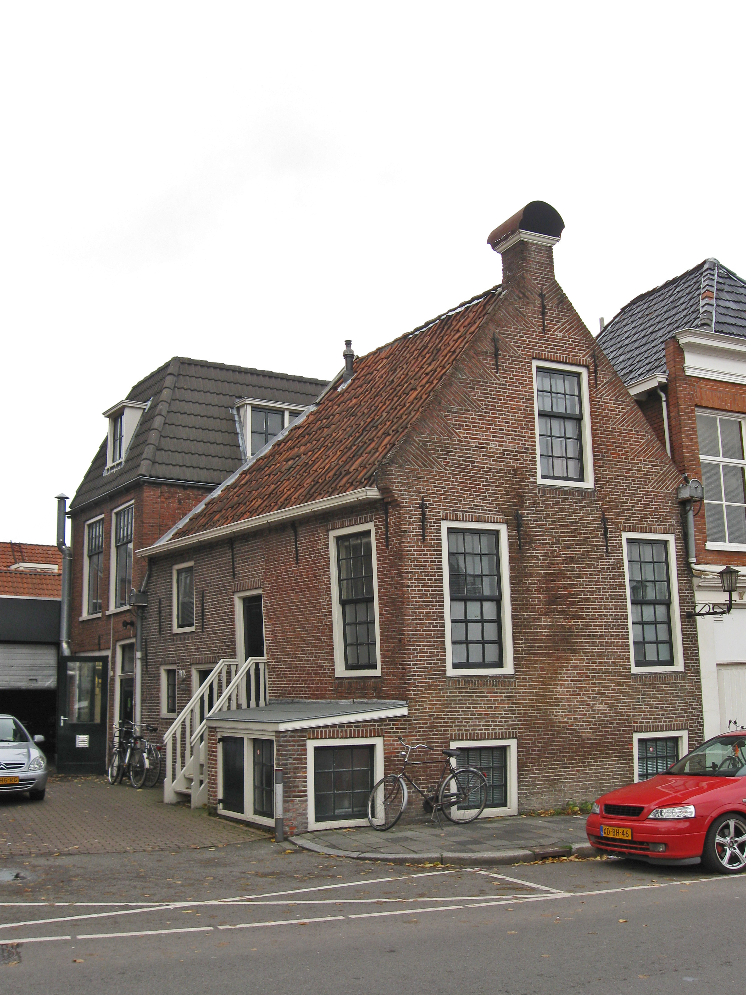 Groningen, Turfsingel 10, Hoekpand met pothuis, 18de eeuw; rm 18706